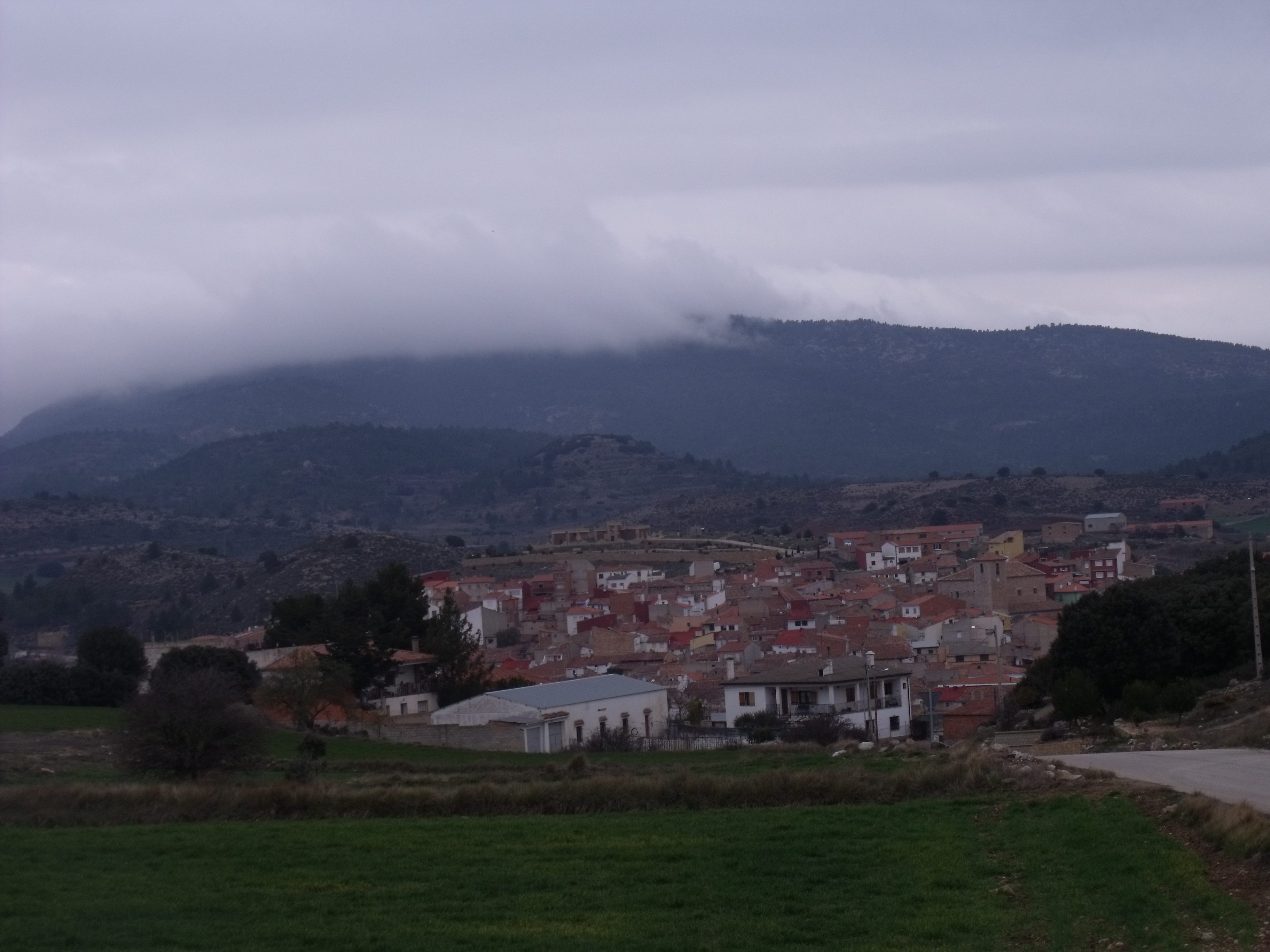 Vista general del pueblo